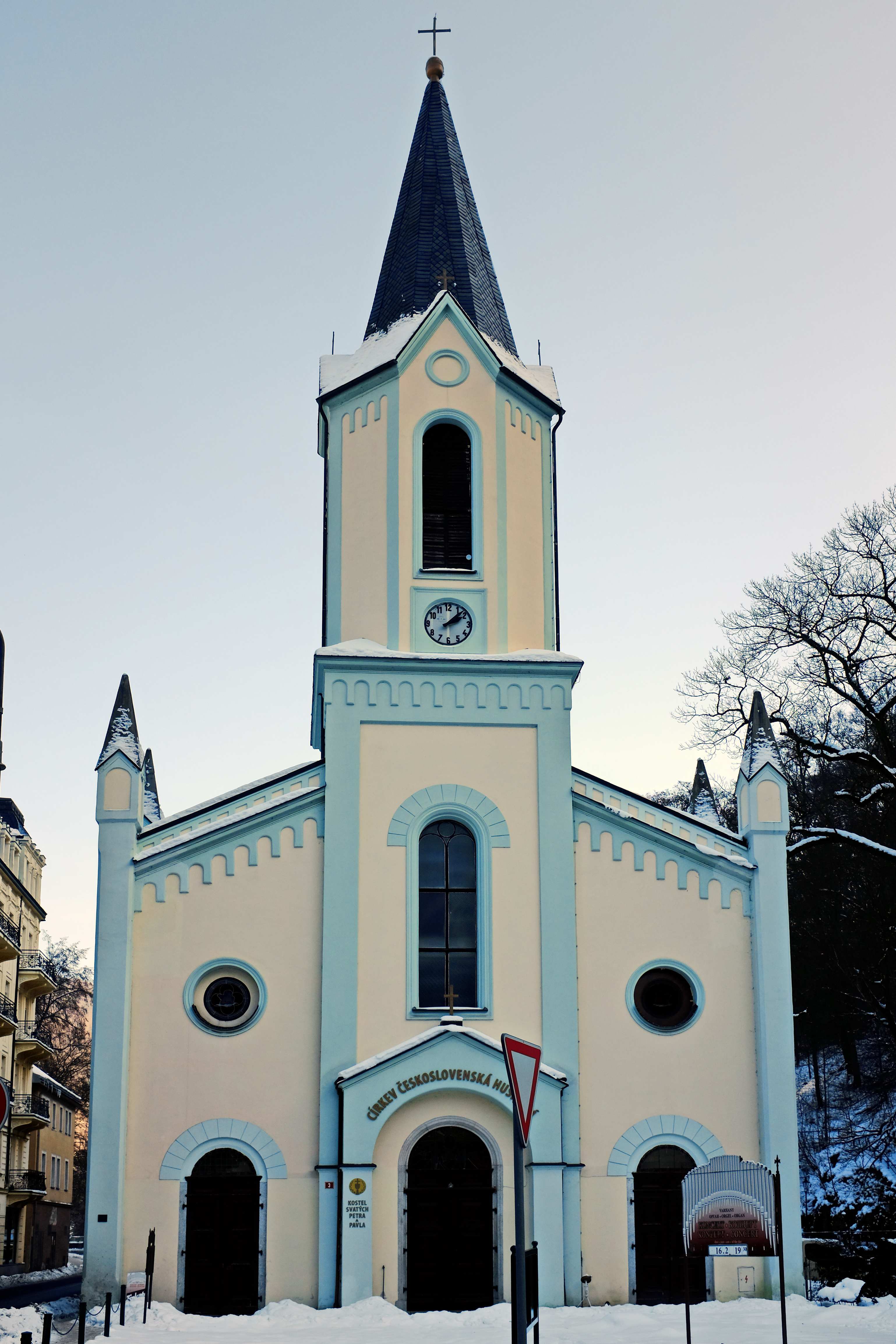 Kostel svatých Petra a Pavla a fara, Mariánskolázeňská čp. 3, 675/4, Karlovy Vary.